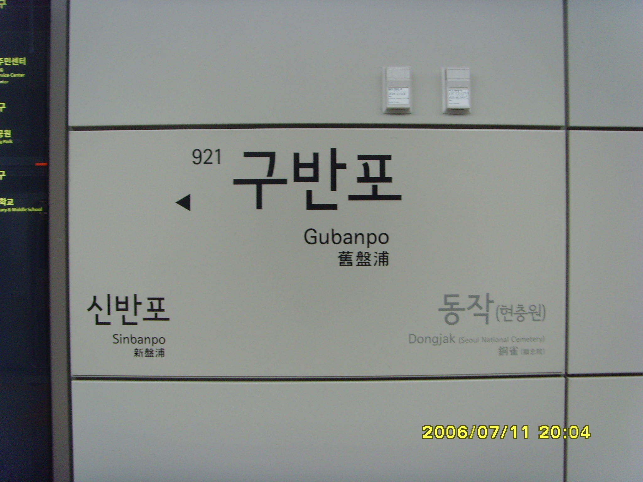 ソウル地下鉄9号線旧盤浦駅 駅名標